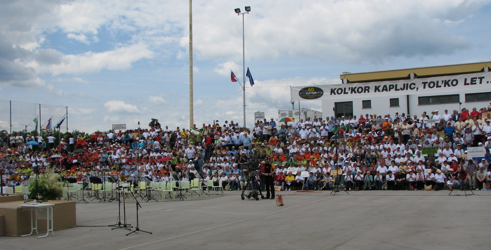 40. Tabor slovenskih pevskih zborov Šentvid pri Stični, junij 2009